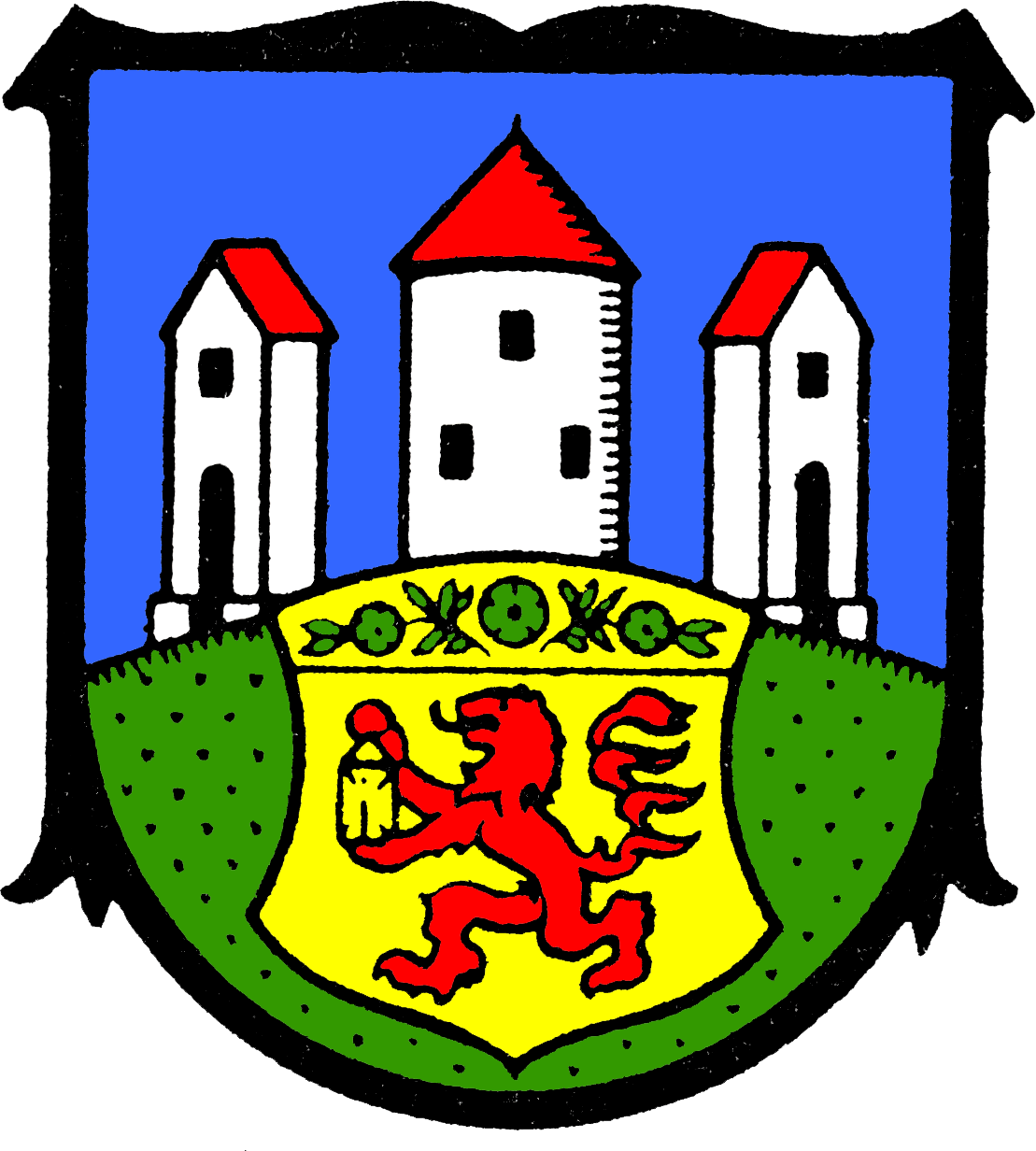 Wappen von Hessisch Lichtenau